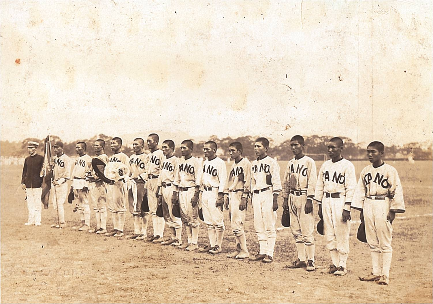 中文（台灣）: 「嘉義農林學校」創立於日治時期大正8年（1919）4月，是當時臺灣在日本殖民體制下，培養農業人才的搖籃。到了昭和3年（1928）設立野球部，起先是由代數老師安藤帶領，後邀請甲子園名校「松山商校」野球教練近藤兵太郎訓練指導。野球部的選手乃由日本學生、原住民學生及漢人學生所組成，不管是什麼族群，大家只有一個信念－贏得冠軍。